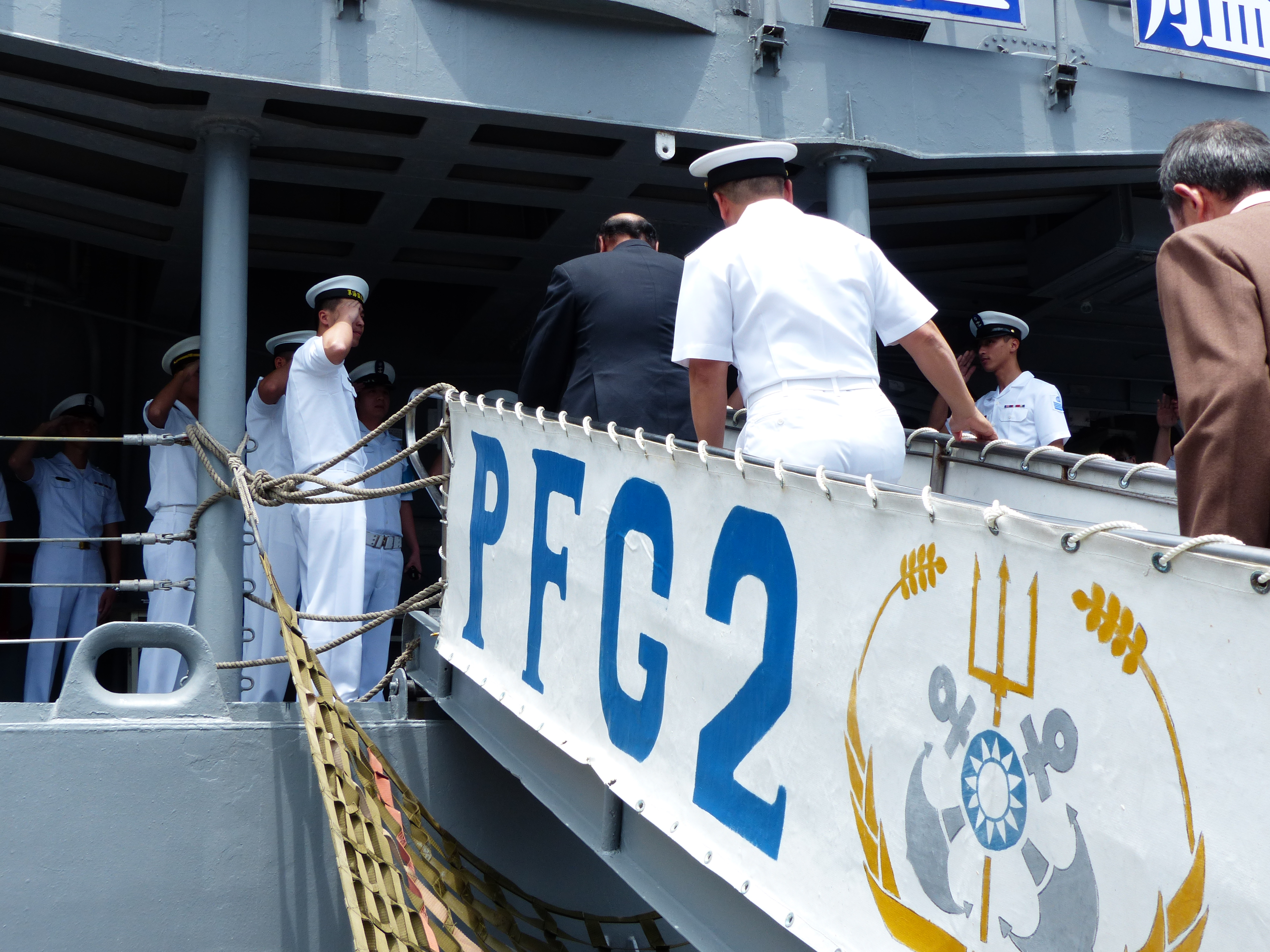 蘇澳鎮鎮長林騰煌（前）、海軍艦隊指揮部司令蒲澤春中將（後）等一行登艦中，巡防艦子儀（PFG2-1107）艦長、值更官、值更軍士、值更衛兵、傳令兵等於梯口行登舷禮。